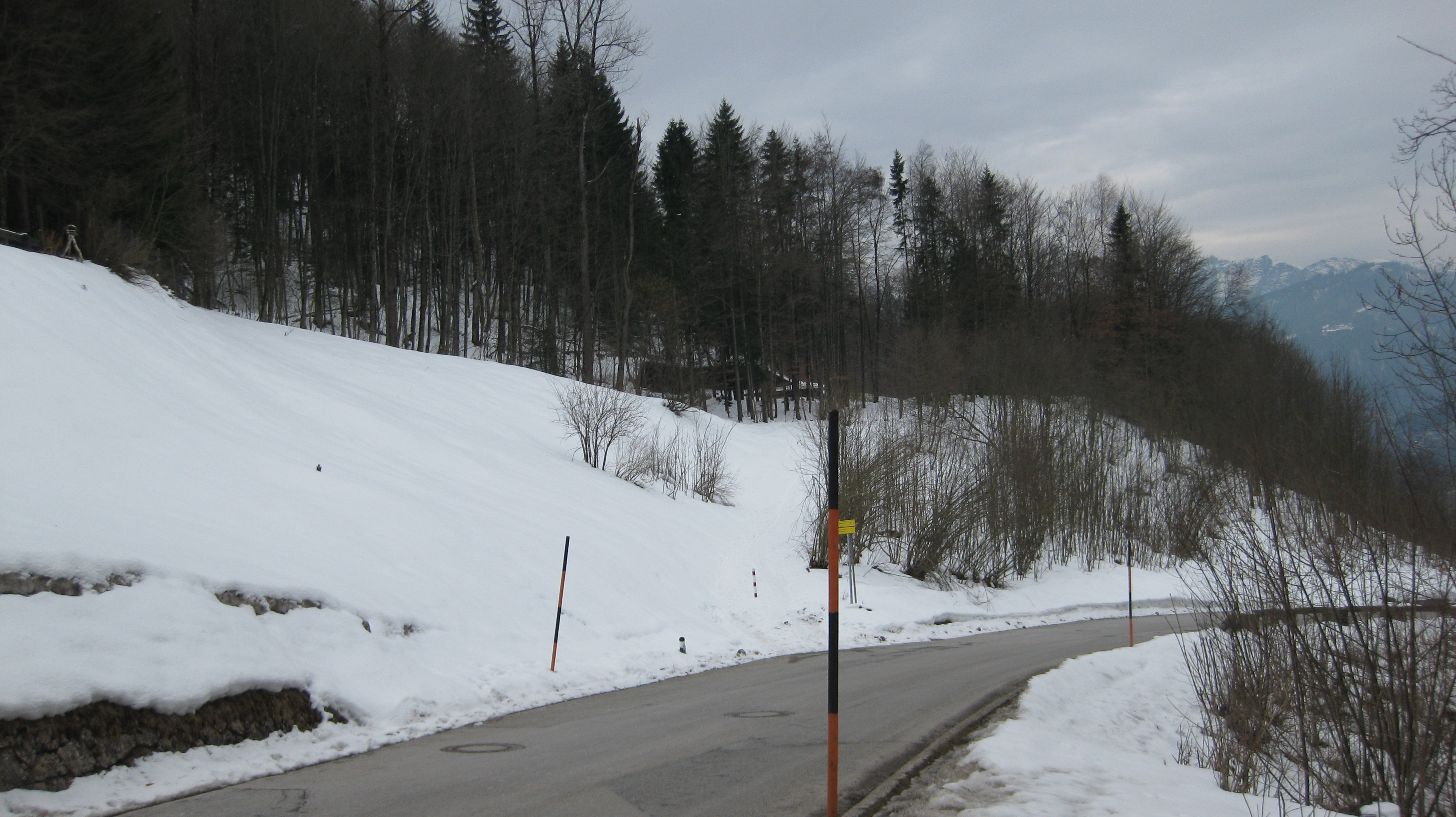 Das Gelände des ehem. Berghofes im März 2011